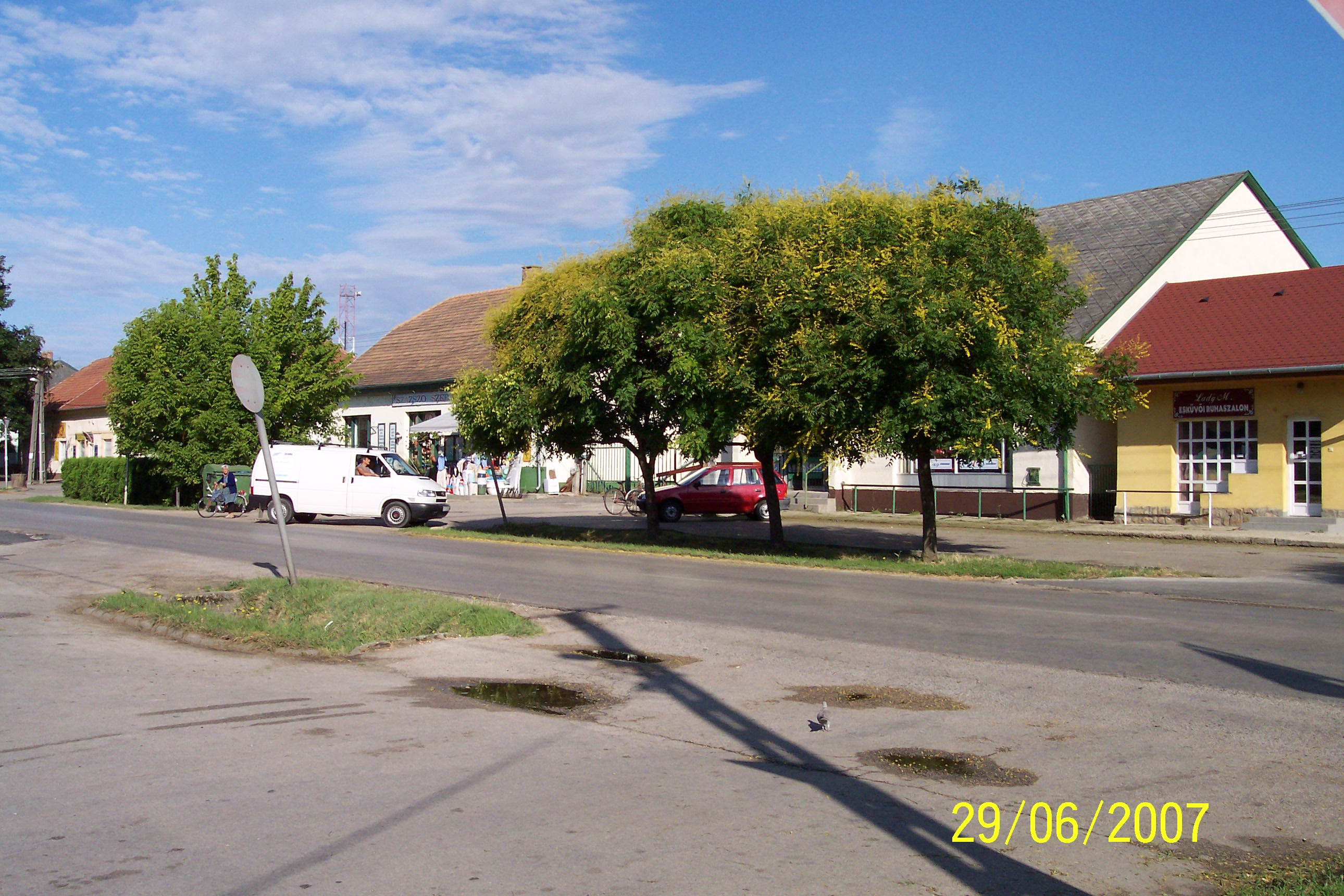 Kàpolnàsnyék Village